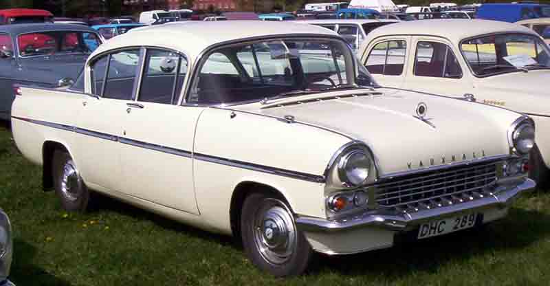 Vauxhall Velox 4-Door Saloon 1958